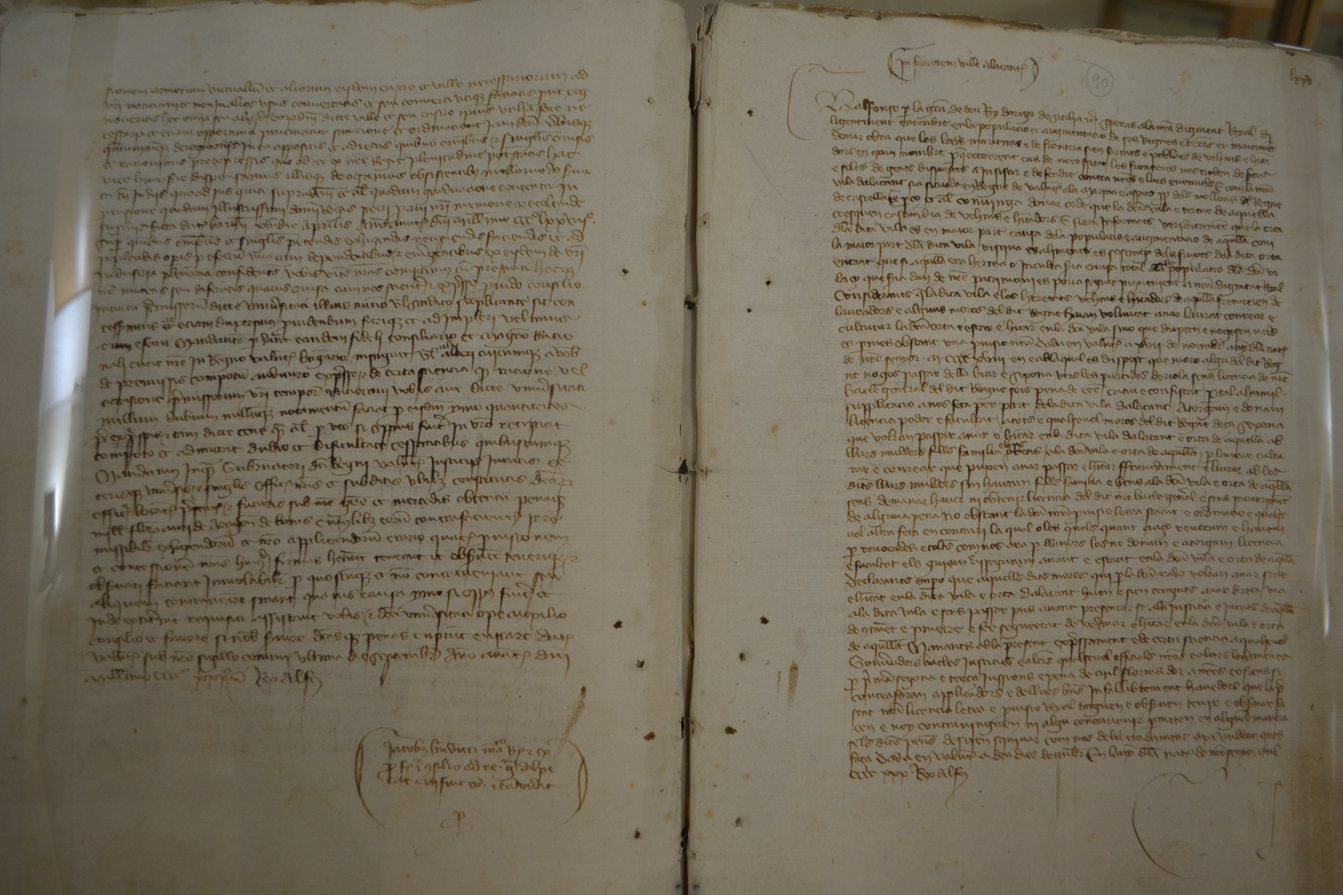 Reial Provisió permetent establir-se i poblar la ciutat i horta d'Alacant als mudéjars, els quals abans ho tenien prohibit, a causa de la manca de població (València, 10 de octubre de 1430). ARV: Reial Cancelleria, llibre 256, fol. 75. Arxiu del Regne de València.